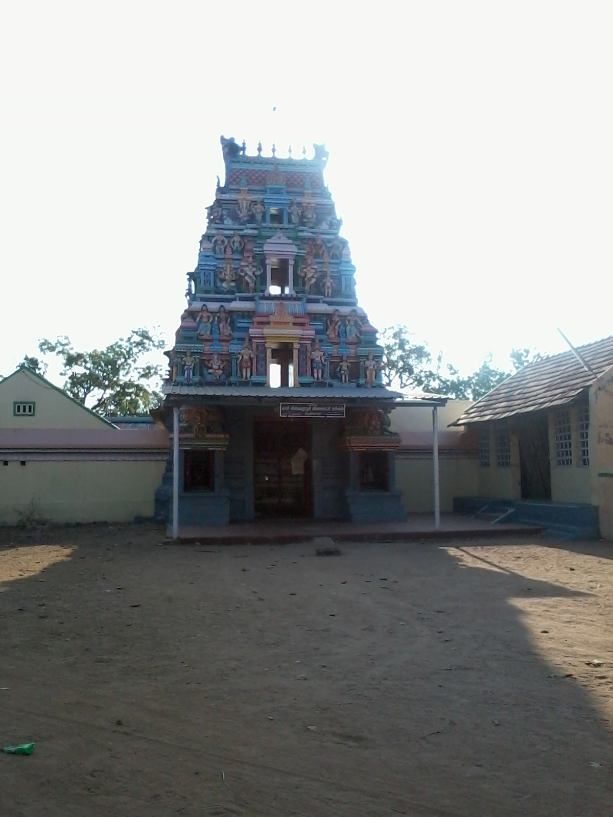 கோயில்